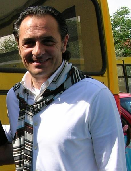 Cesare Prandelli in visita ad una scuola elementare fiorentina.